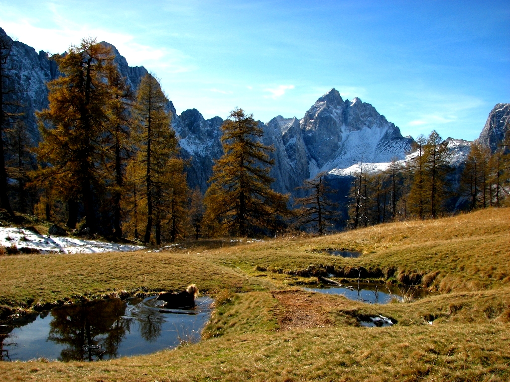 Pogled na Jalovec s Slemena.